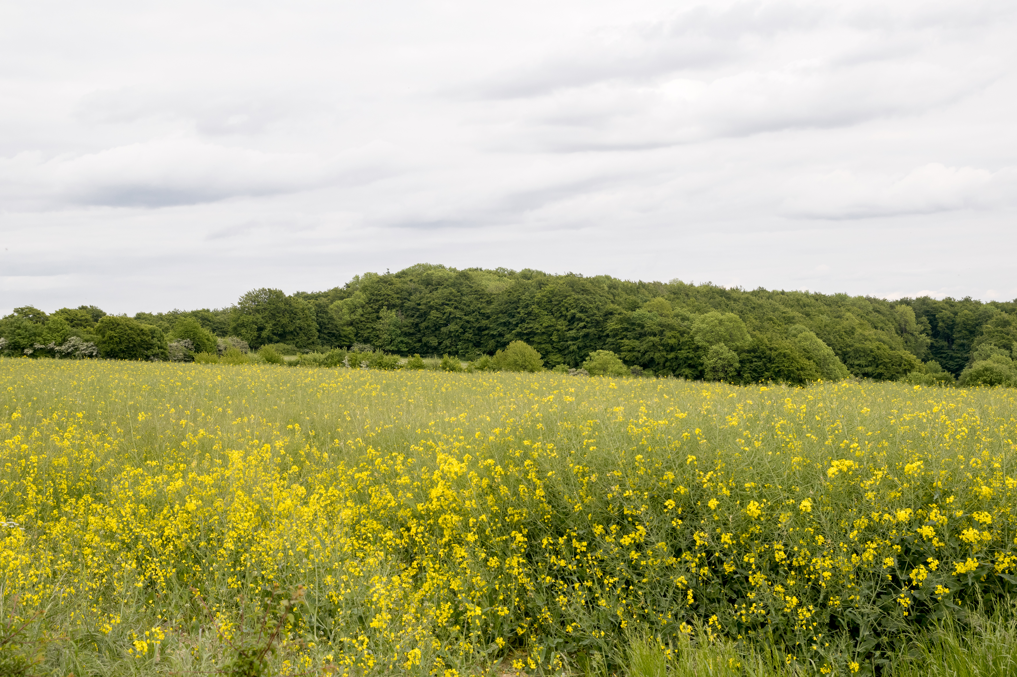 Naturschutzgebiet Buchenwald bei Bellenberg, Bellenberg, Stadt Horn-Bad Meinberg, Kreis Lippe